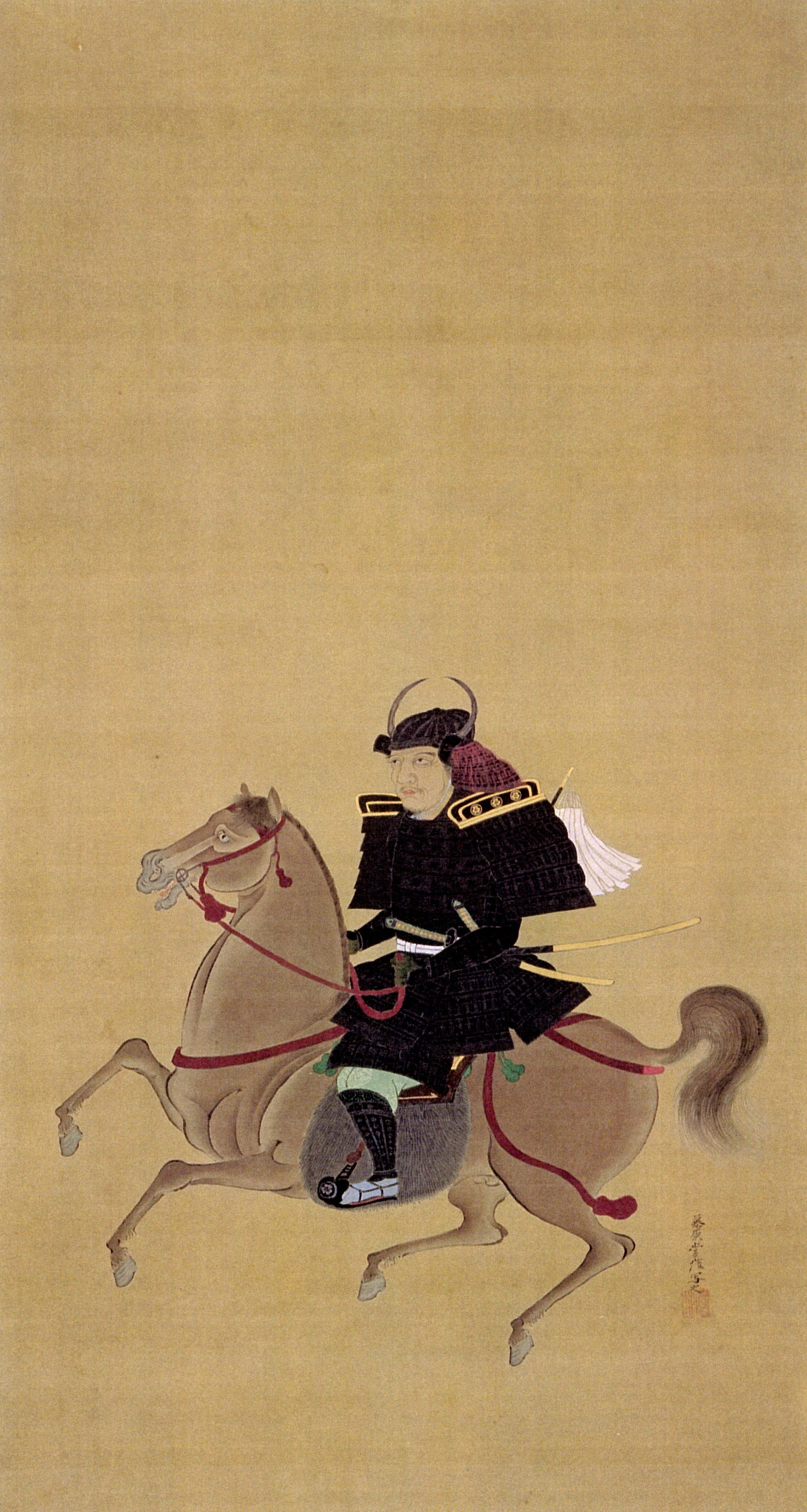 成瀬正親の肖像。